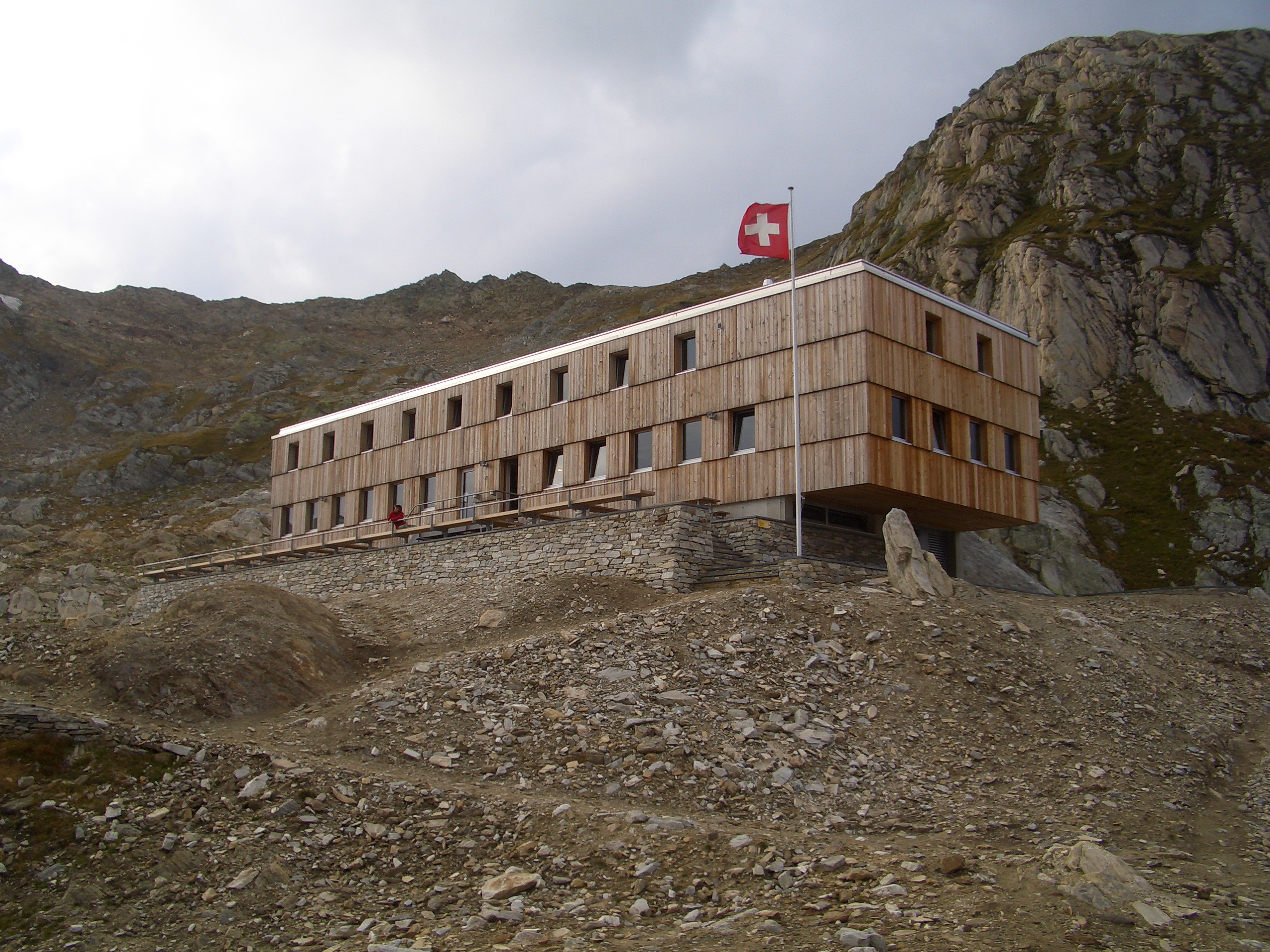 Campana Cristallina, Tessin, Schweiz